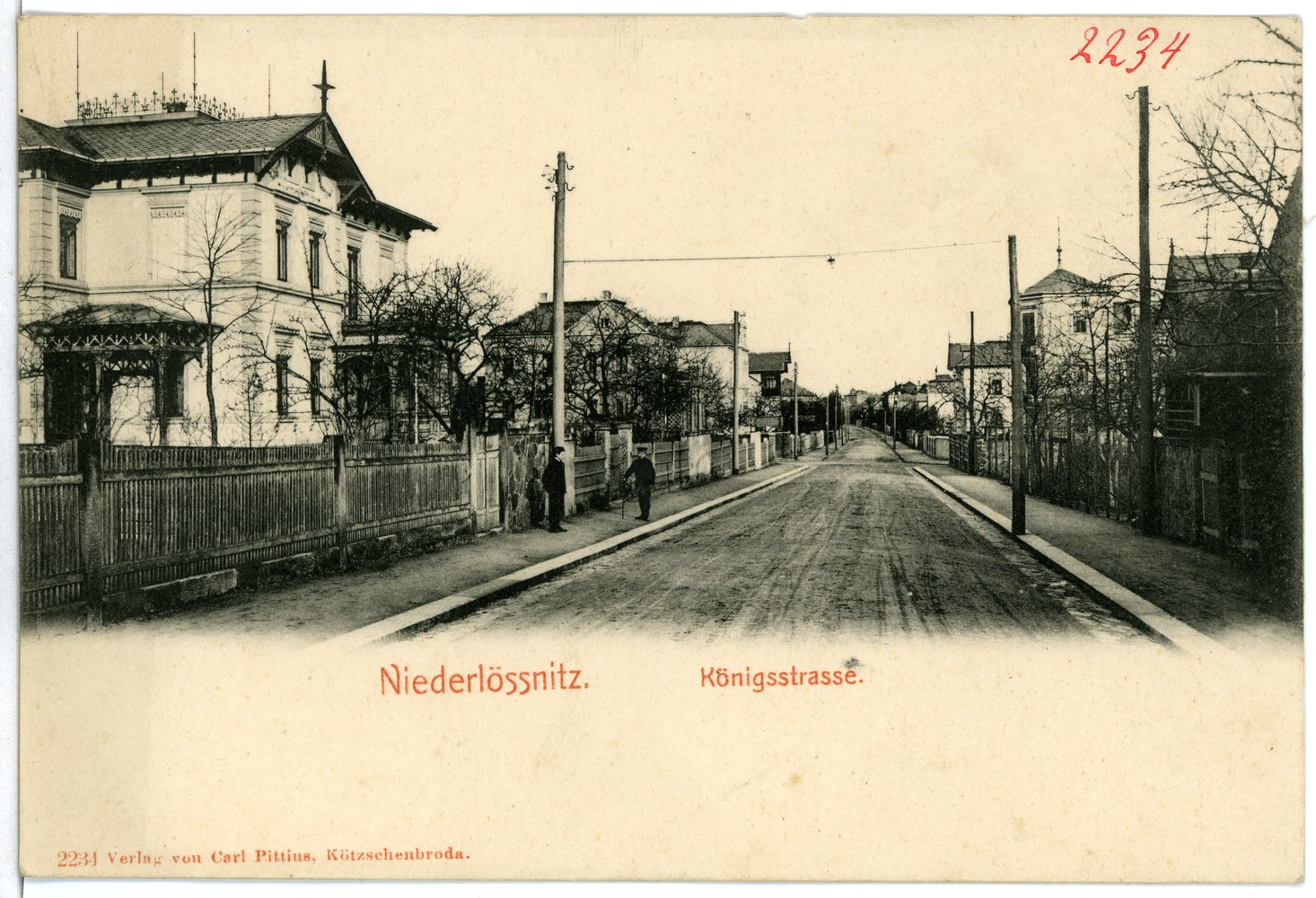 Niederlößnitz; Königstraße This postcard is from publisher Brück & Sohn in Meißen ( postcard has a unique number 02234 and is available in a higher resolution at the publisher. This images was uploaded in a cooperation project between Wikipedians and the publisher.